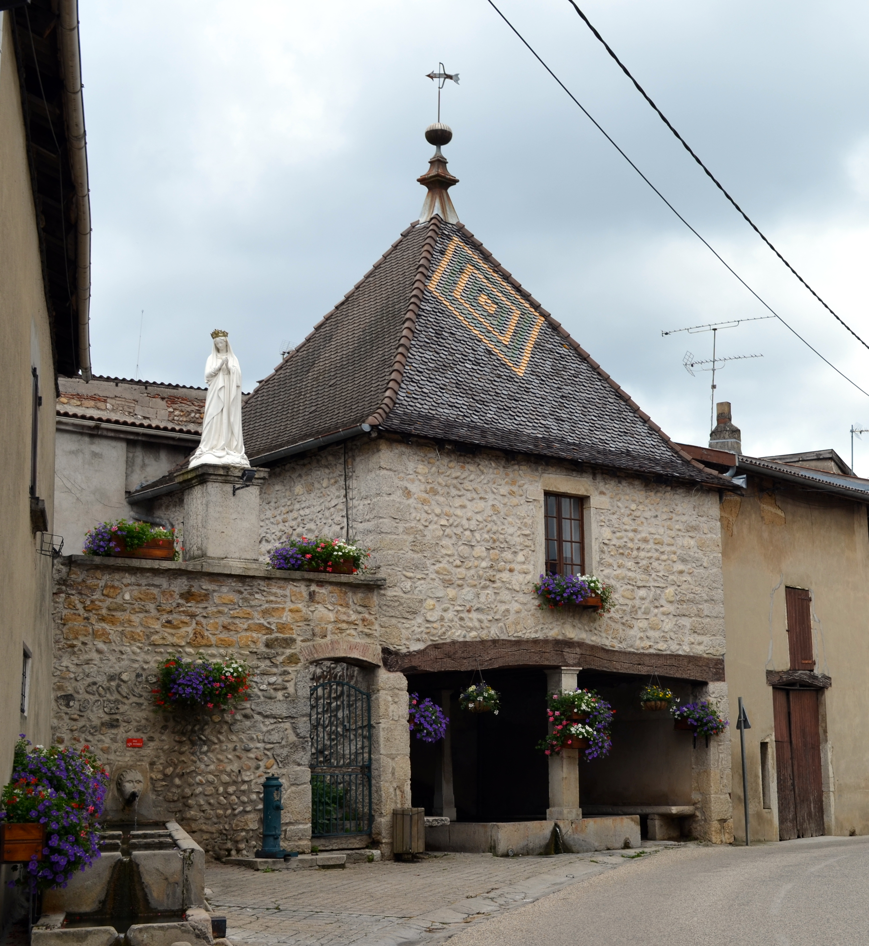 Statue de la Vierge et lavoir à Leyment.